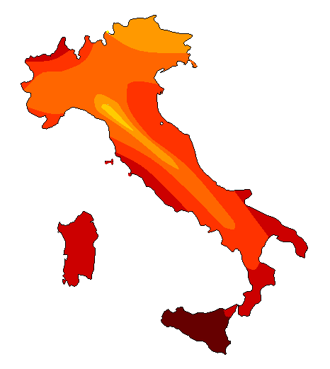 Carta della radiazione solare globale in Italia in luglio 28 MJ/mq